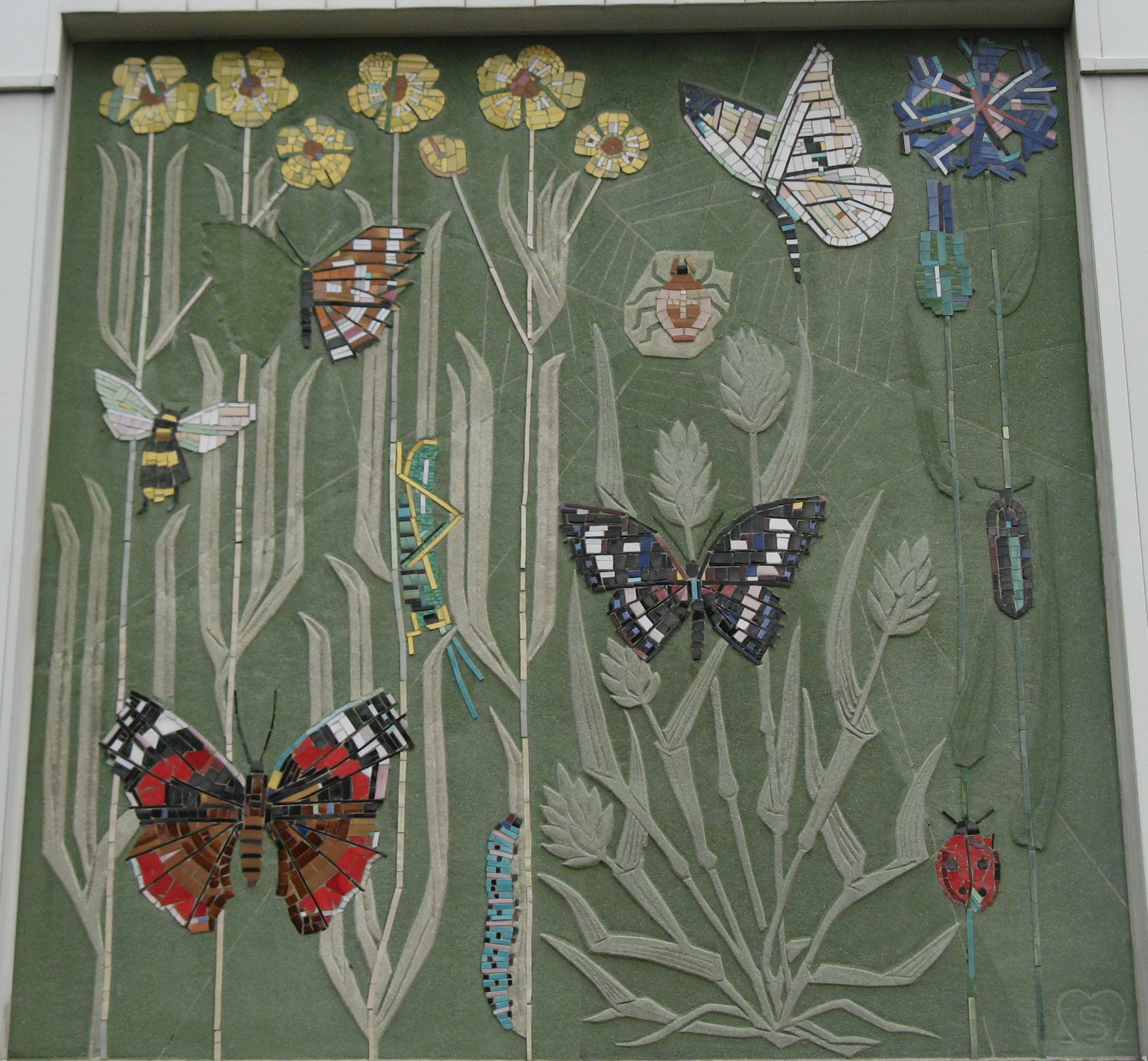 Wiesenblumen mit Schmetterlingen.label QS:Lde,"Wiesenblumen mit Schmetterlingen."